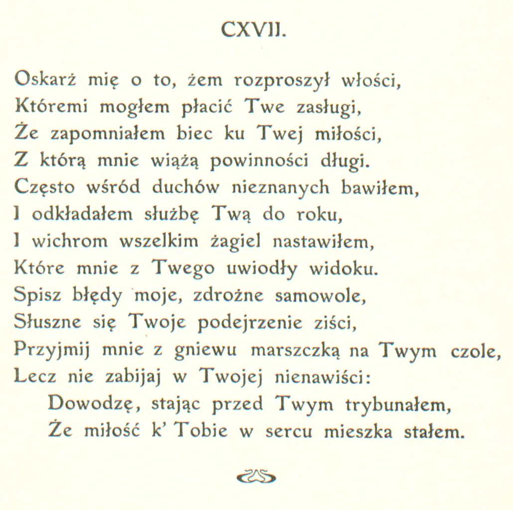 Sonety Shakespeare'a I-CXXXIV i CXXXVII-CLIV tłumaczenie Maria Sułkowska (MUS) sonet 117 strona 131